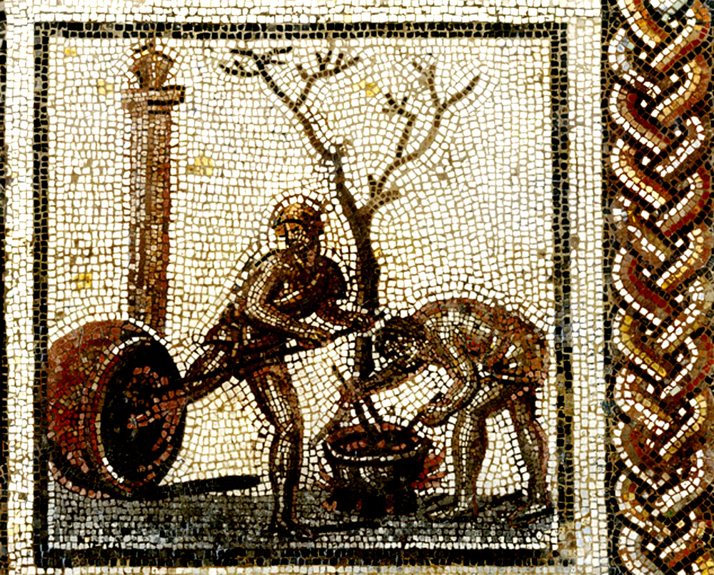 Mosaïque de Saint-Romain-en-Gal poissage des dolia